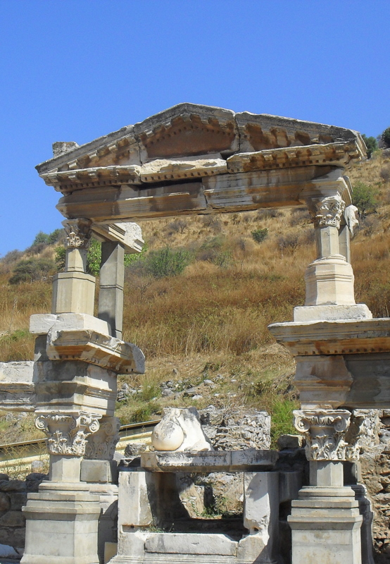 Efez, Fontanna Trajana